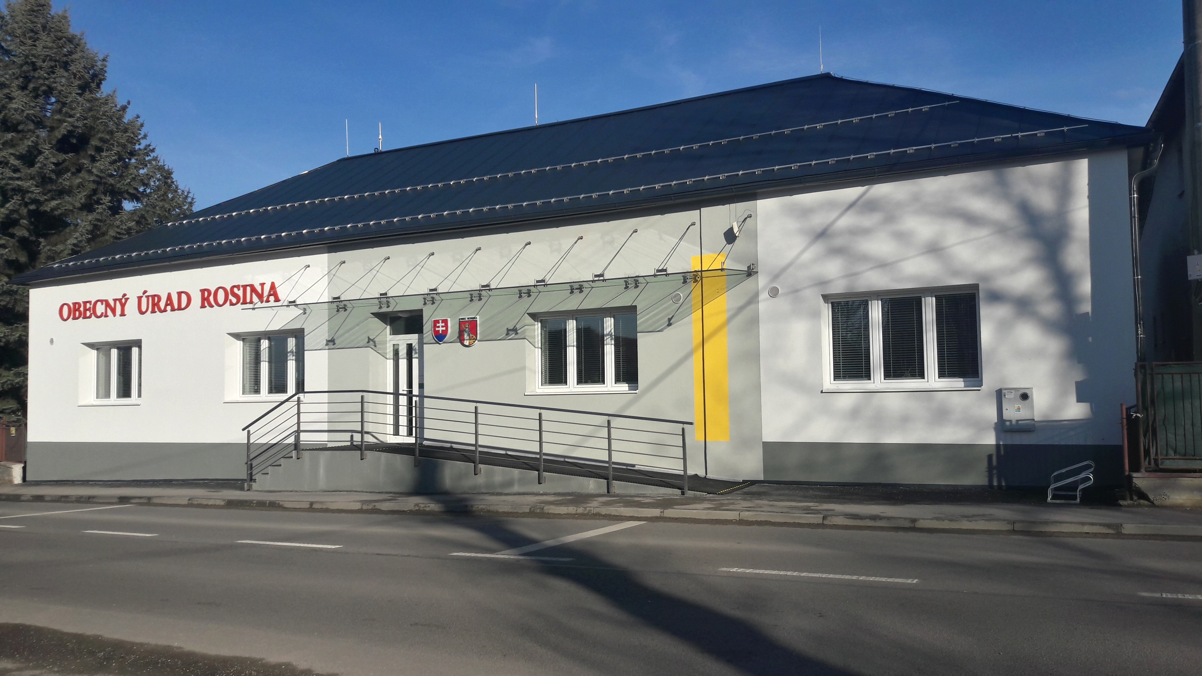 Obecný úrad Rosina